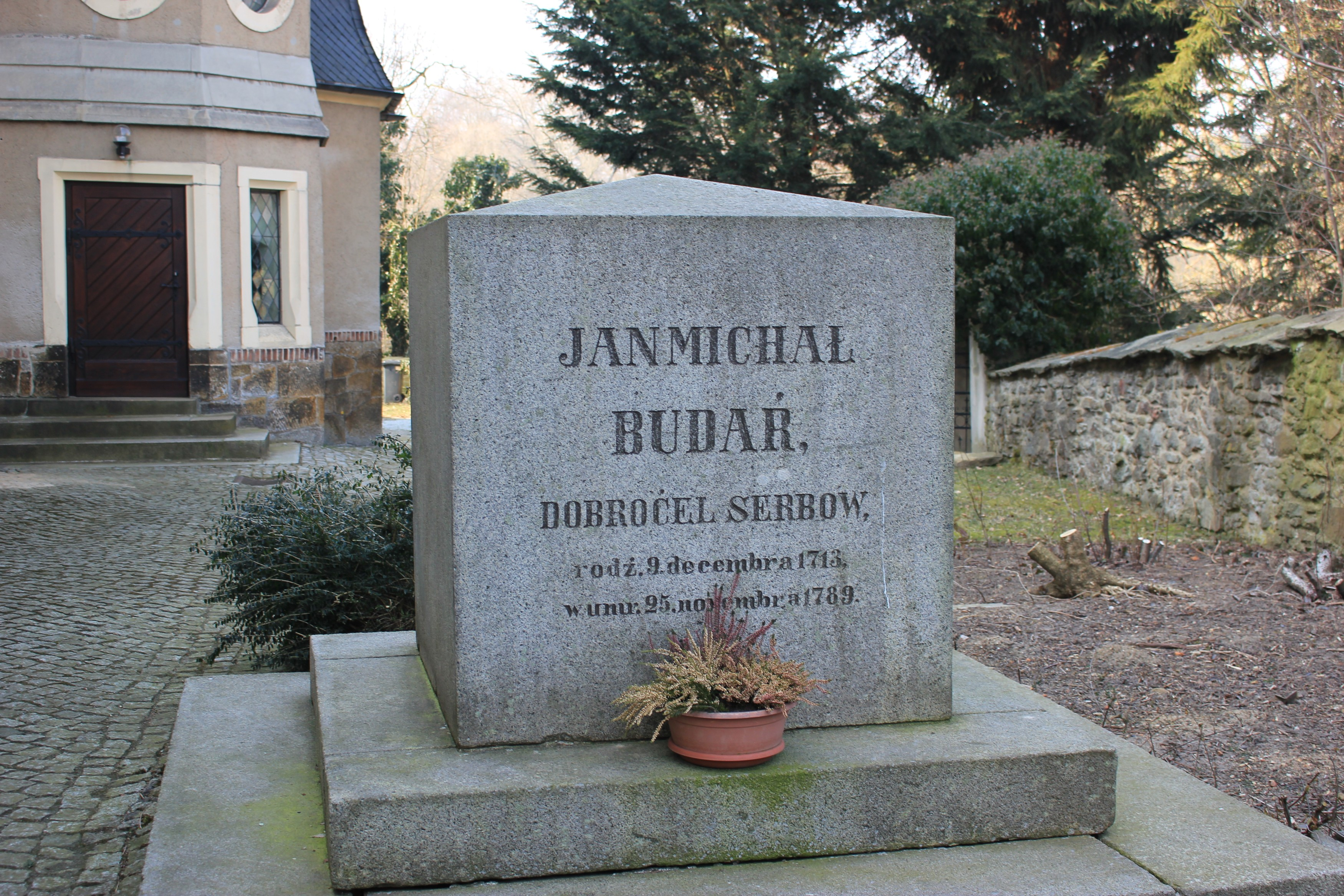 Hornjoserbsce: Pomnik za Jana Michała Budarja na starym kěrchowje při Budestečanskej ewangelskej cyrkwi.